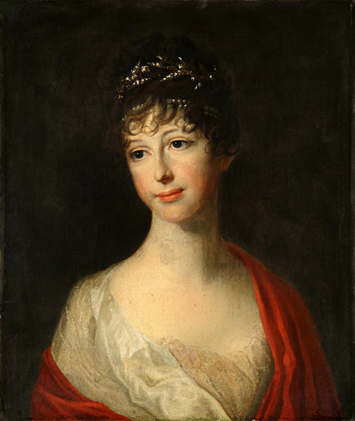 Maria Pawlowna, Erbprinzessin von Sachsen-Weimar-Eisenach (1786–1859)